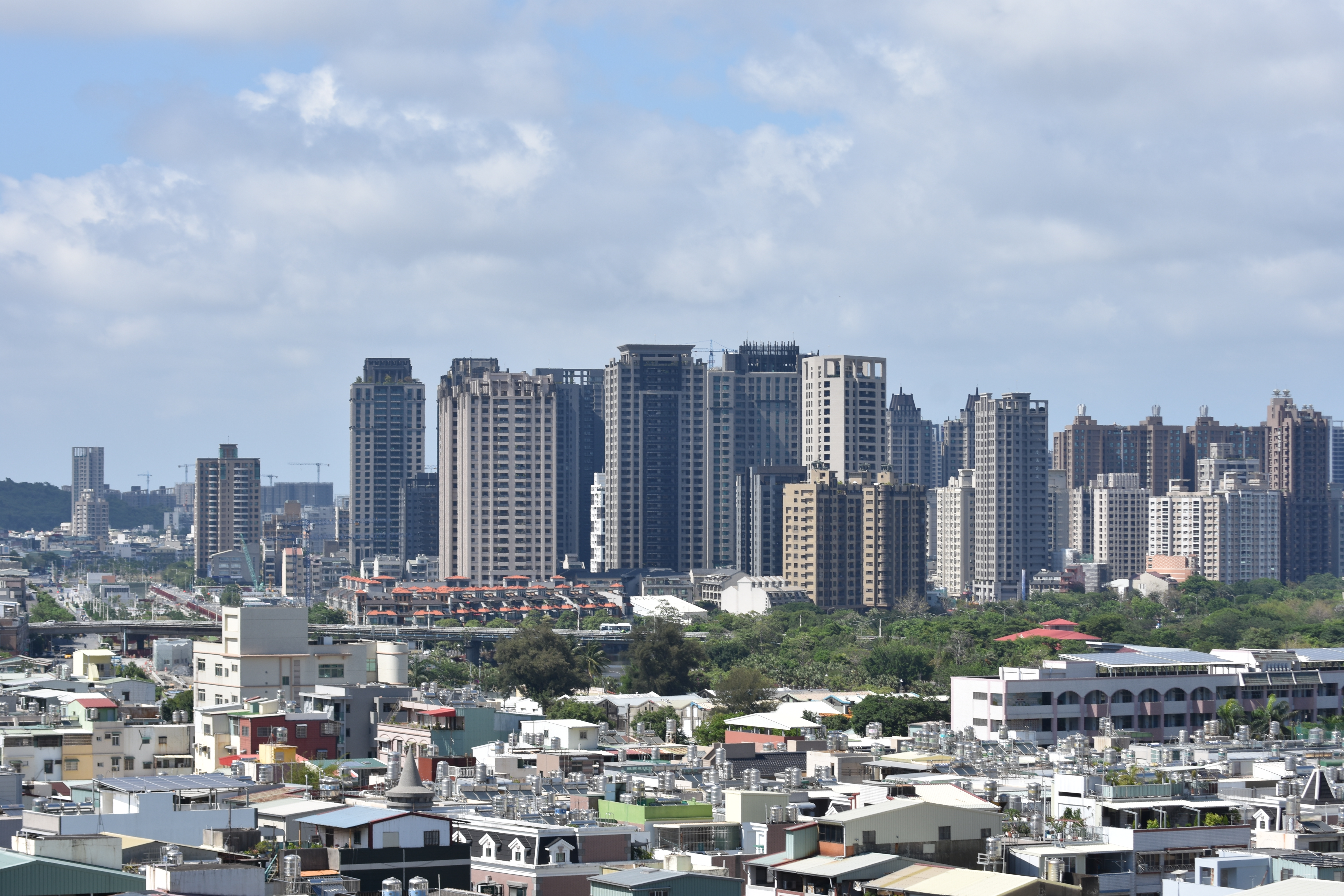 中文（台灣）: 左營區高樓群。